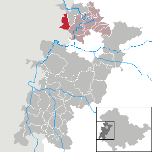 Ifta in Thuringia - Wartburgkreis